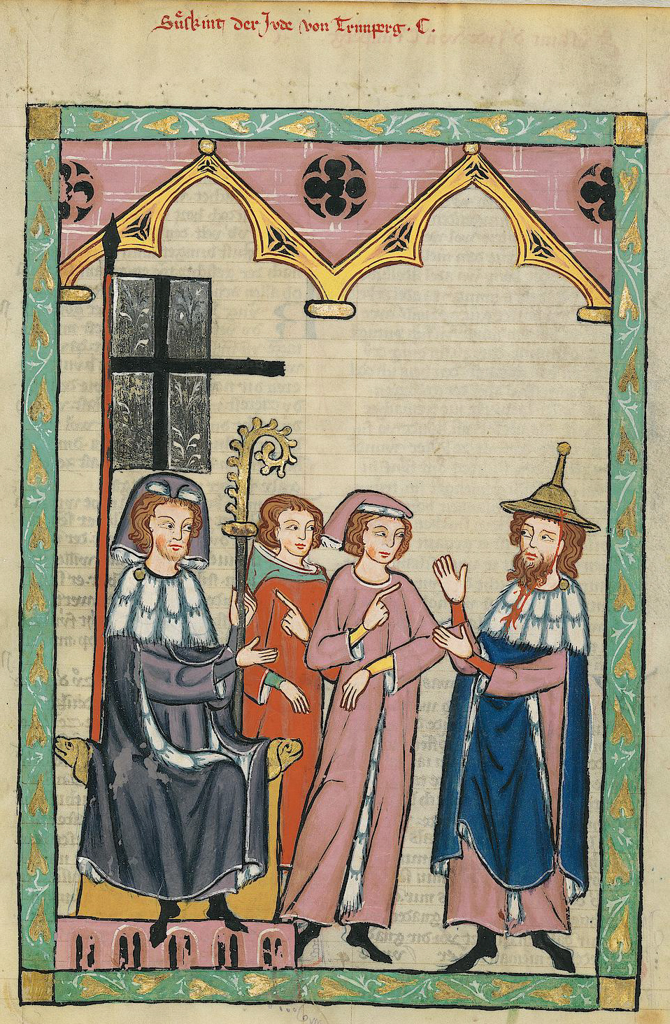 Codex Manesse, fol. 355r, Süßkind, der Jude von Trimberg. Der mit einem Judenhut bekleidete und auch durch den Bart als Jude gekennzeichnete Süßkind spricht vermutlich vor einem Vogt in Konstanz vor (das Fehlen einer Mitra und das schwarz-weiße Banner lassen in dem Thronenden auf einen weltlichen Herrn schließen, nicht etwa den Bischof von Konstanz). [Anmerkung: Der Kragen aus Fehwammenfell („Schönwerk“) des auch als Bischof gedeuteten linken Herrn lässt sich vielleicht als katholische Mozetta deuten. Wobei beachtenswert ist, dass der Jude ebenfalls genau die gleiche, Klerikern und anderen hochgestellten Personen vorbehaltene, Fehkleidung trägt. Beide, sowie die Person in der Mitte, tragen außerdem ein Innenfutter aus Schönwerk, die Person in der Mitte zusätzlich eine mit Fehwamme gefütterte Haube.]